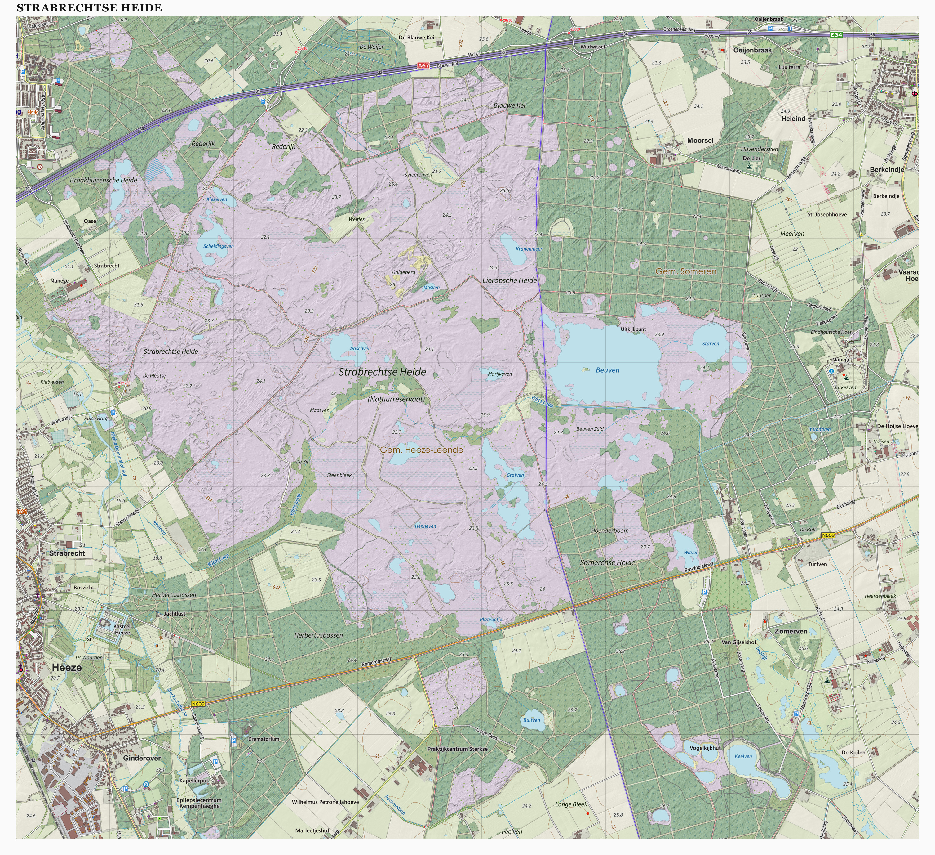 Topografische natuurkaart. Resolutie: 400 pixels/km. Samengesteld door Jan-Willem van Aalst op basis van de GML open geodata van de BRT/Top10NL (basisregistratie Topografie, Kadaster), vrijgegeven door Kadaster onder de Creative Commons BY licentie. Additionele gegevens uit BAG uit de Open Street Map en uit de Risicokaart. Zie ook de Legenda.